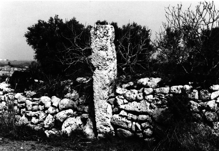 Descrizione: Menhir in località Terenzano. Ugento, Italia. Fonte: foto personale Data: 15.06.2002 Autore: Antonio Pizzurro